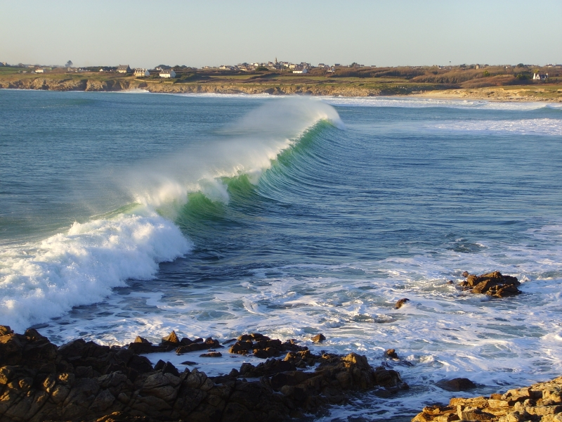 Houle déferlant sur la plage de St-Tugen (Primelin, Finistère, France)